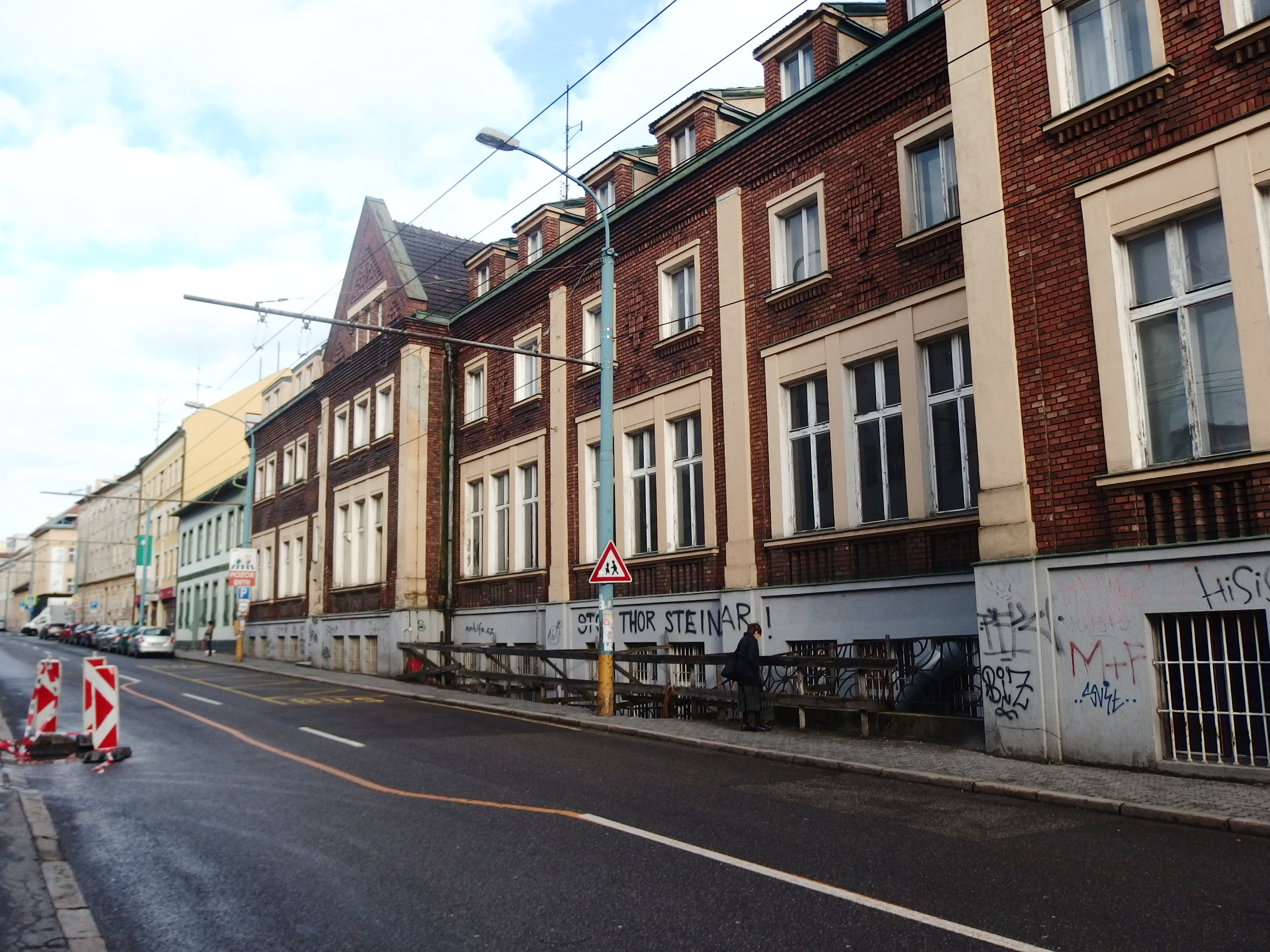 Bratislava, Karpatská ulica.